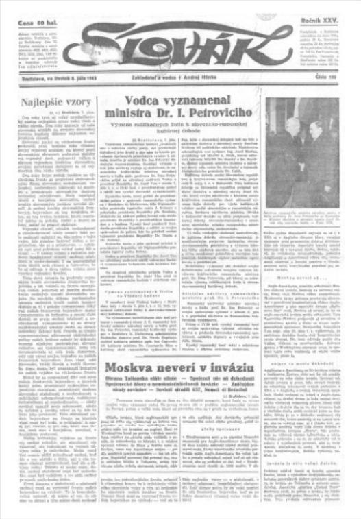 Titulný list časopisu Slovák.